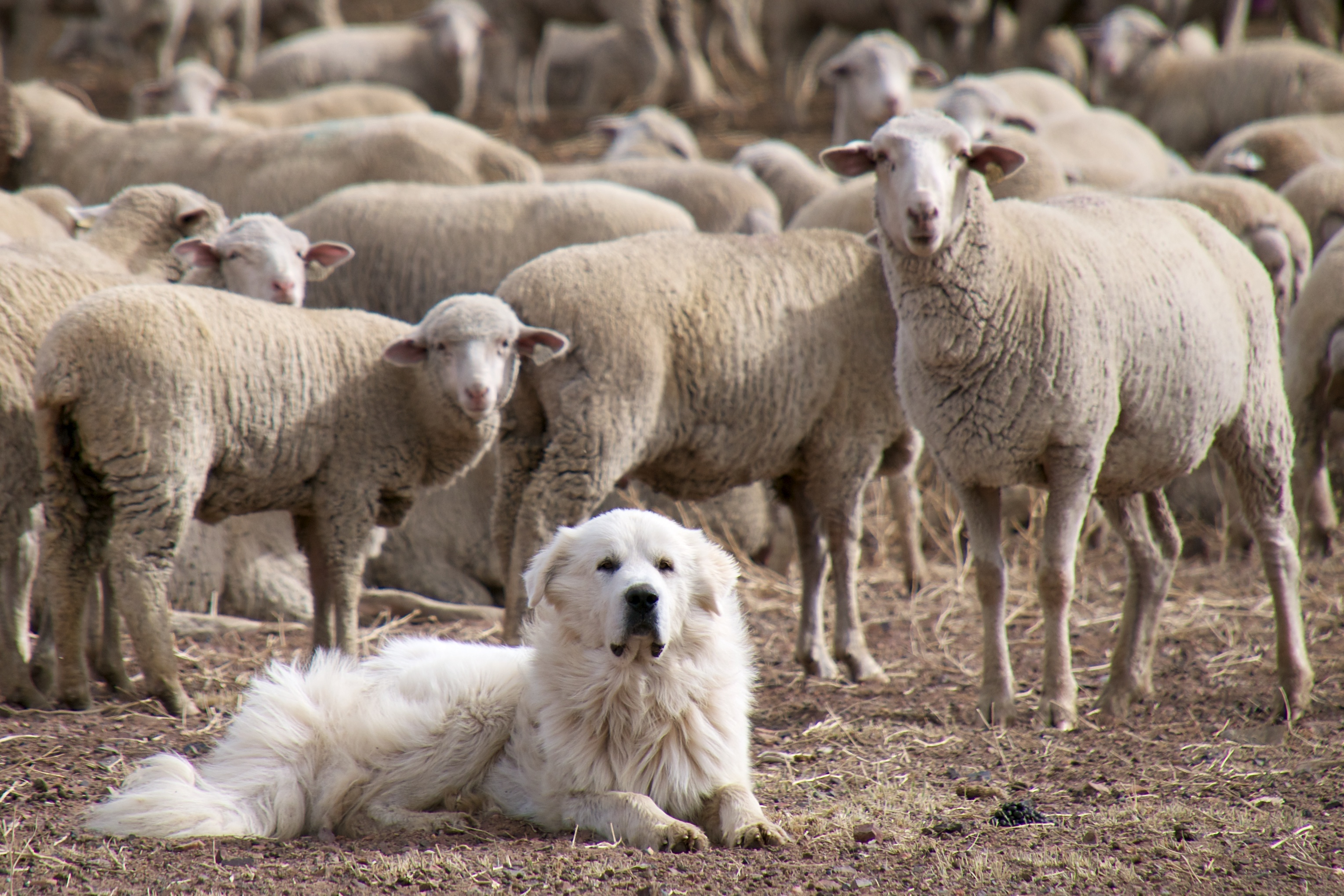 Troupeau des Pyrénées et ses agneaux gardé par un "berger des Pyrénées"